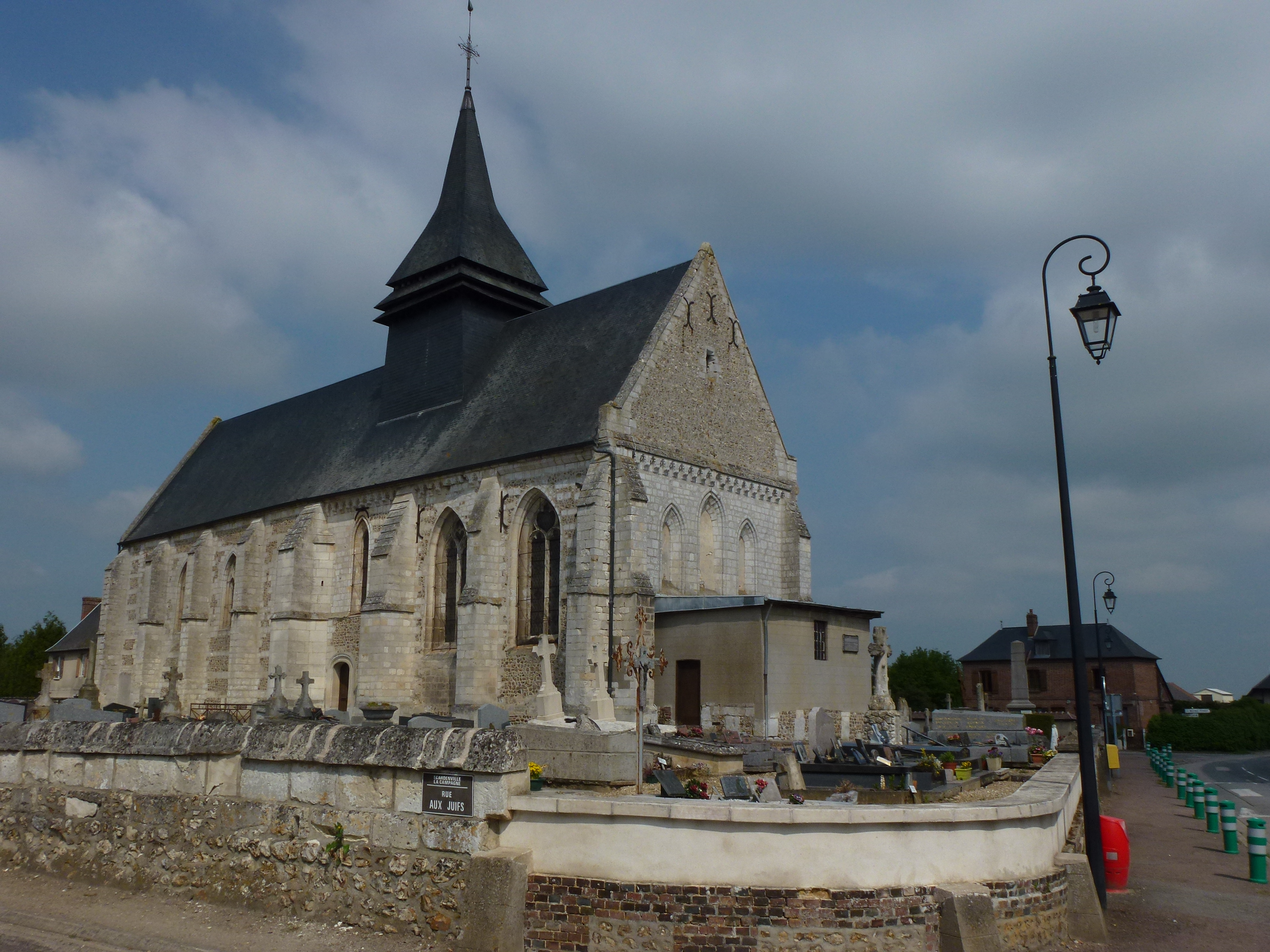 Écardenville-la-Campagne (Eure, Fr) : église Saint-Martin.